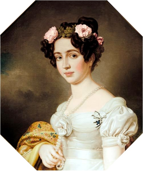 Joseph Stieler: Königin Elisabeth von Preußen, nach 1843